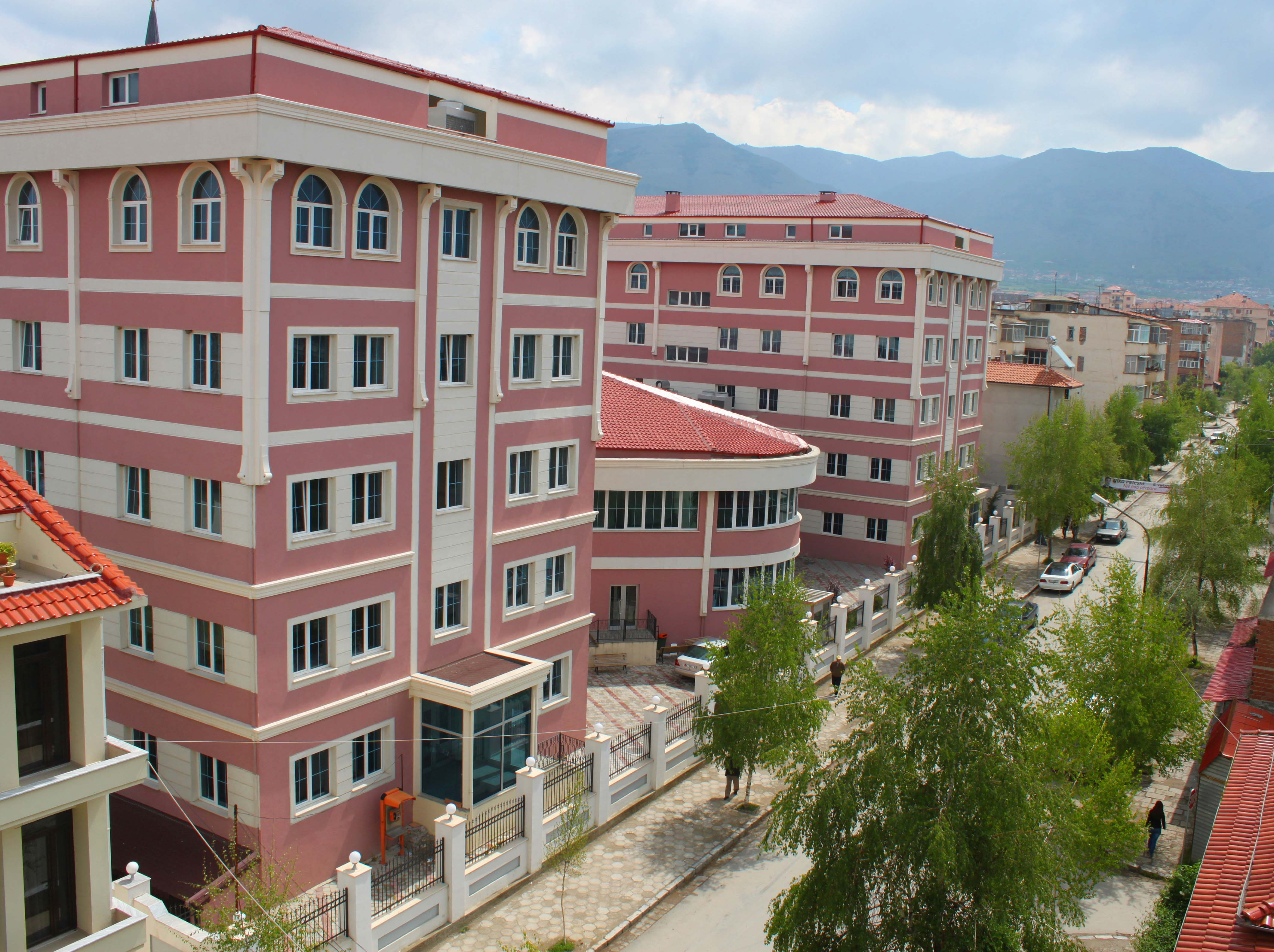 Korca medresesi